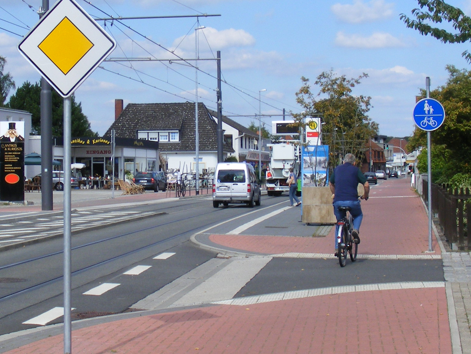 Gemeinsame Fuß- und Radwege als Ein-Richtungs-Radwege beidseits in der Hauptstraße, Lilienthal bei Bremen